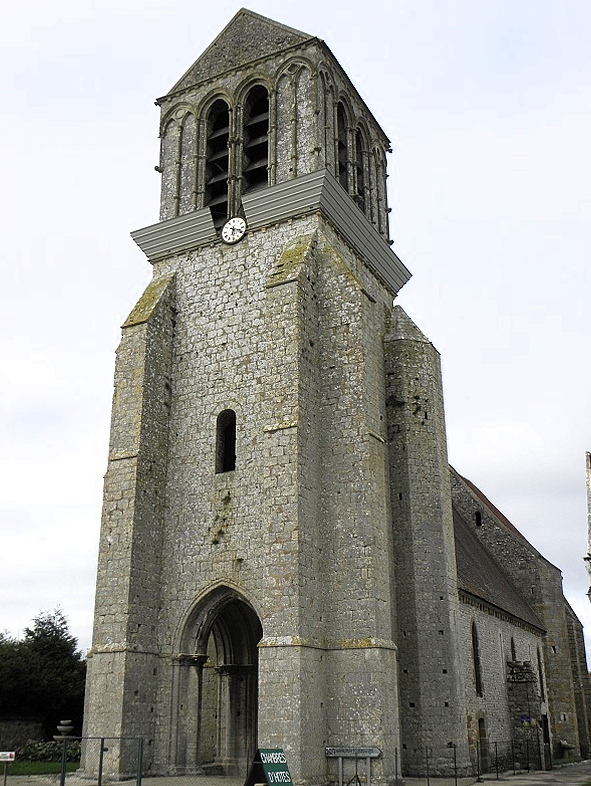 ♫4glise Saint-Georges de Lizines (77).